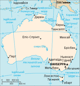 Мапа Австралії.(Деякі острови, приналежні до країни, не відображені).